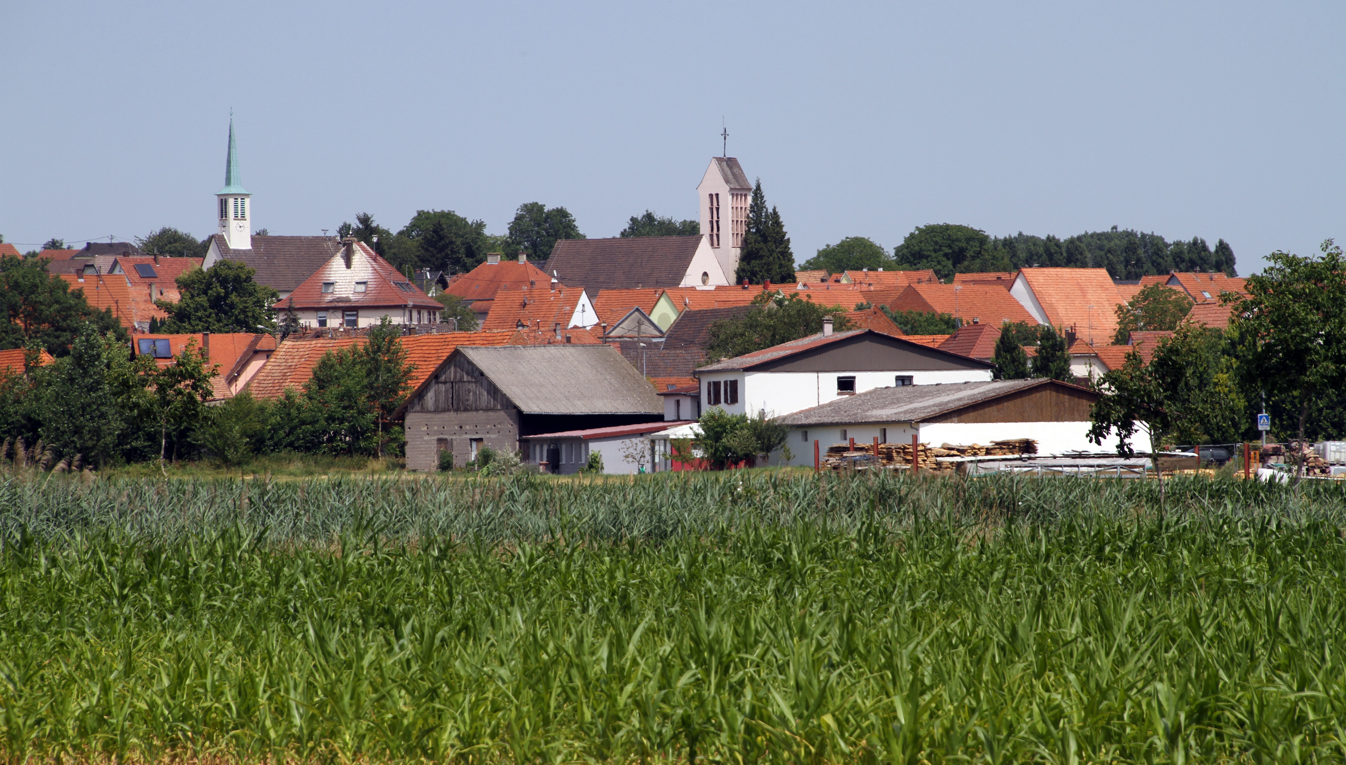 Buhl (Bas-Rhin)